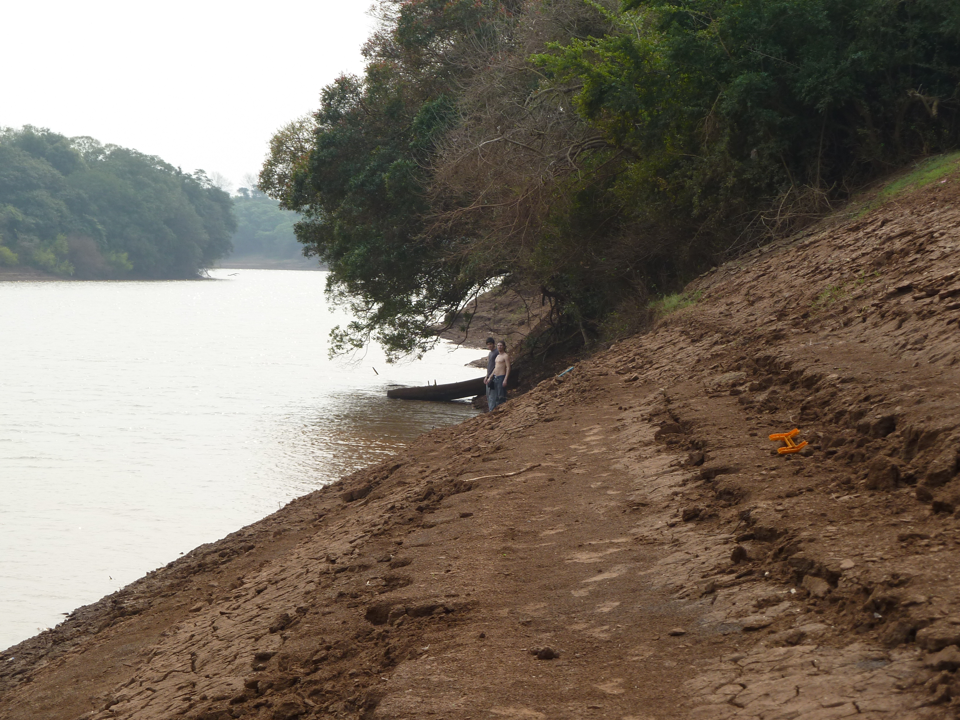 Desembocadura del Río Aguapey, localidad de Alvear.